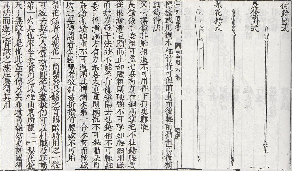 《三才圖會》中對標鎗、長鎗與梨花鎗的介紹。